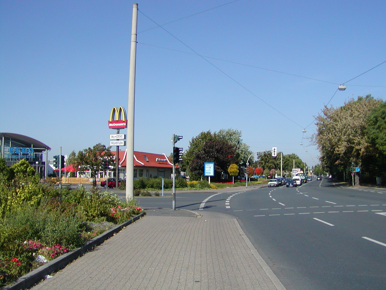 Oberhausen - Nähe Berozentrum